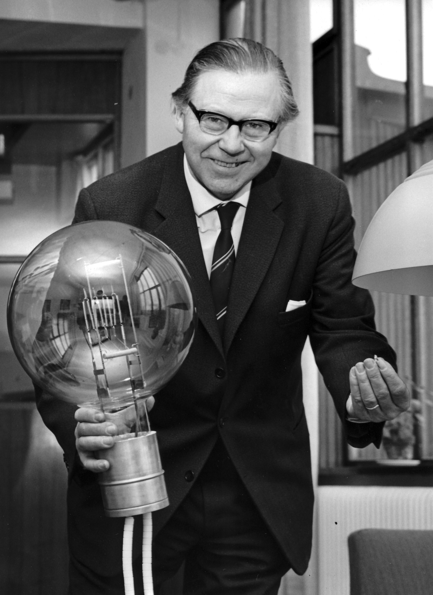 Finansministern Gunnar Sträng med den största och den minsta Lumalampan vid ett besök på fabriken 1961. Foto: Malms reportagebyrå